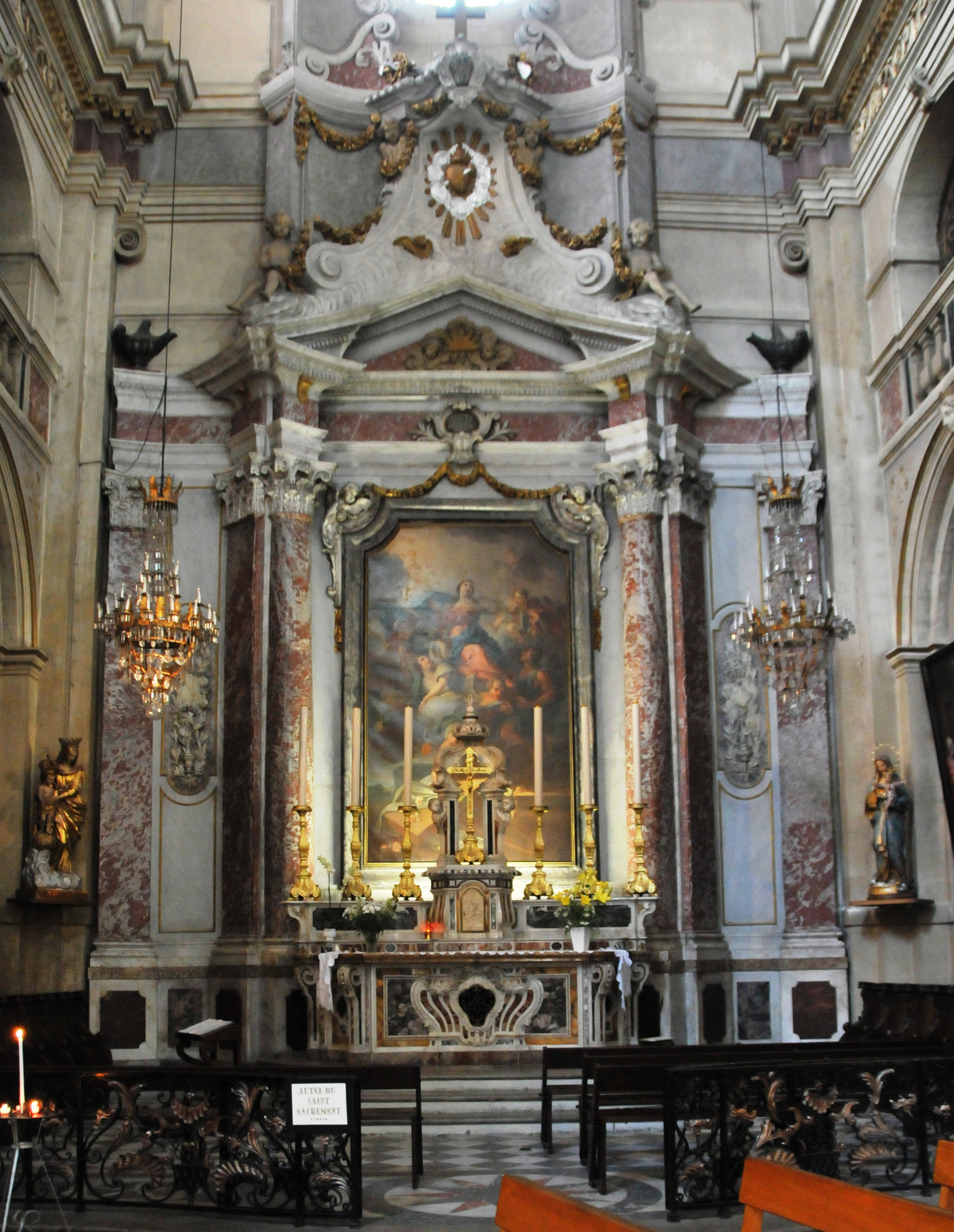 Dax, Kathedrale, Marienkapelle